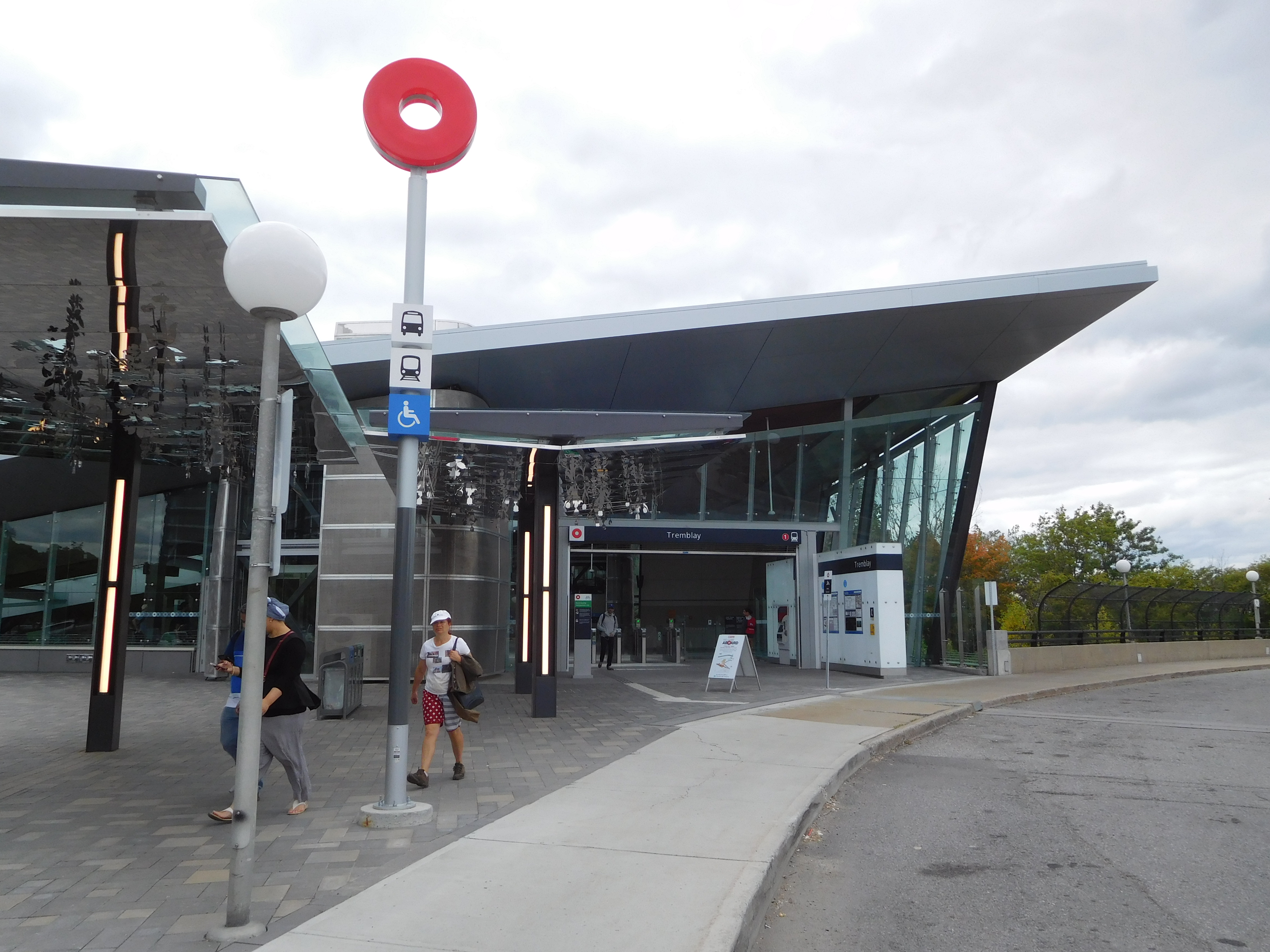 Station Tremblay de la ligne de la Confédération à Ottawa